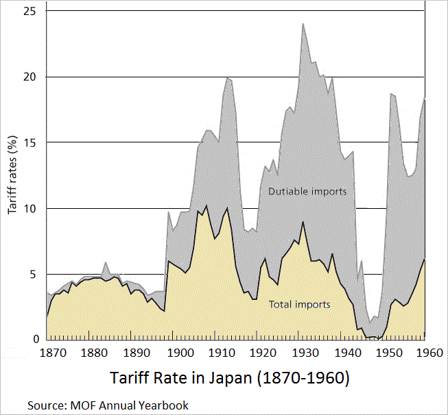 Tariff Rate in Japan (1870-1960)